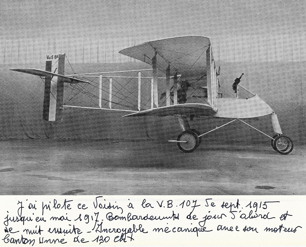 Avion de bombardement en 1915, le biplan Voisin, piloté par Armand Viguier, pilote de chasse, à la VB 107.